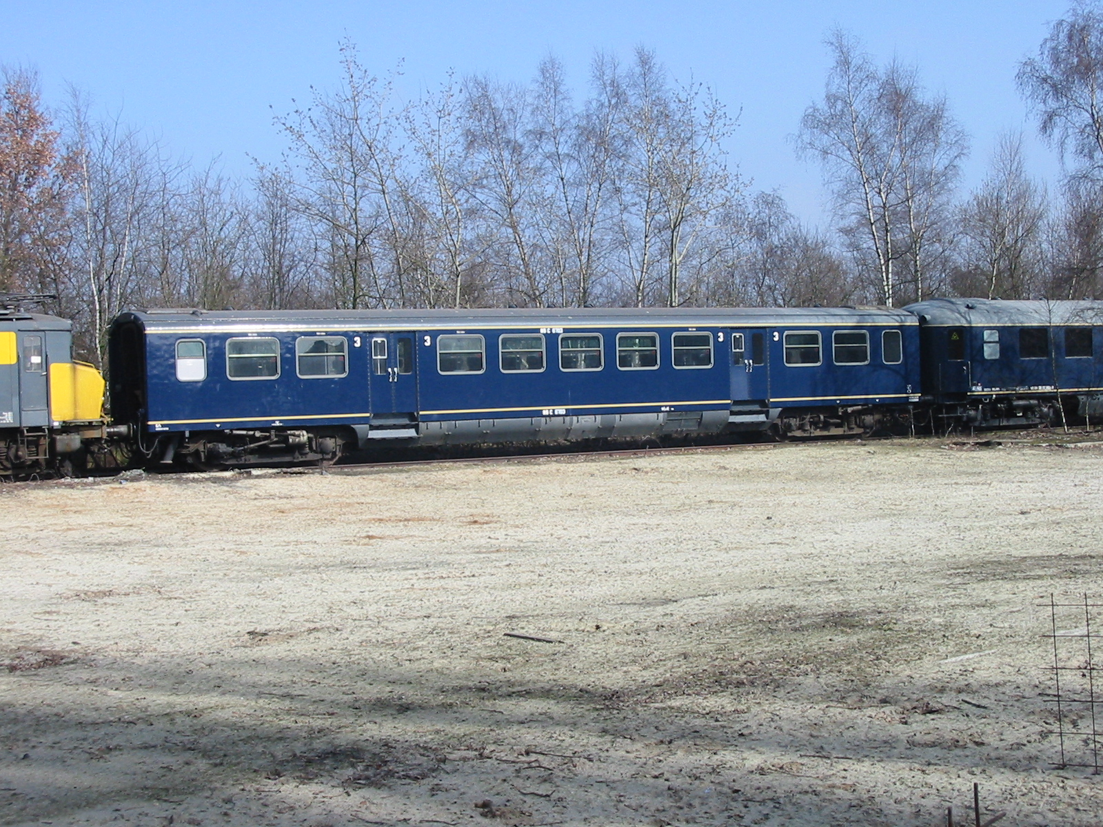 Rijtuig Plan E 3e klasse C6703, in bezit van het Nederlands Spoorwegmuseum te Utrecht, tijdens een show te Blerick op 19 maart 2006. Fotograaf: J.H. de Kroon.